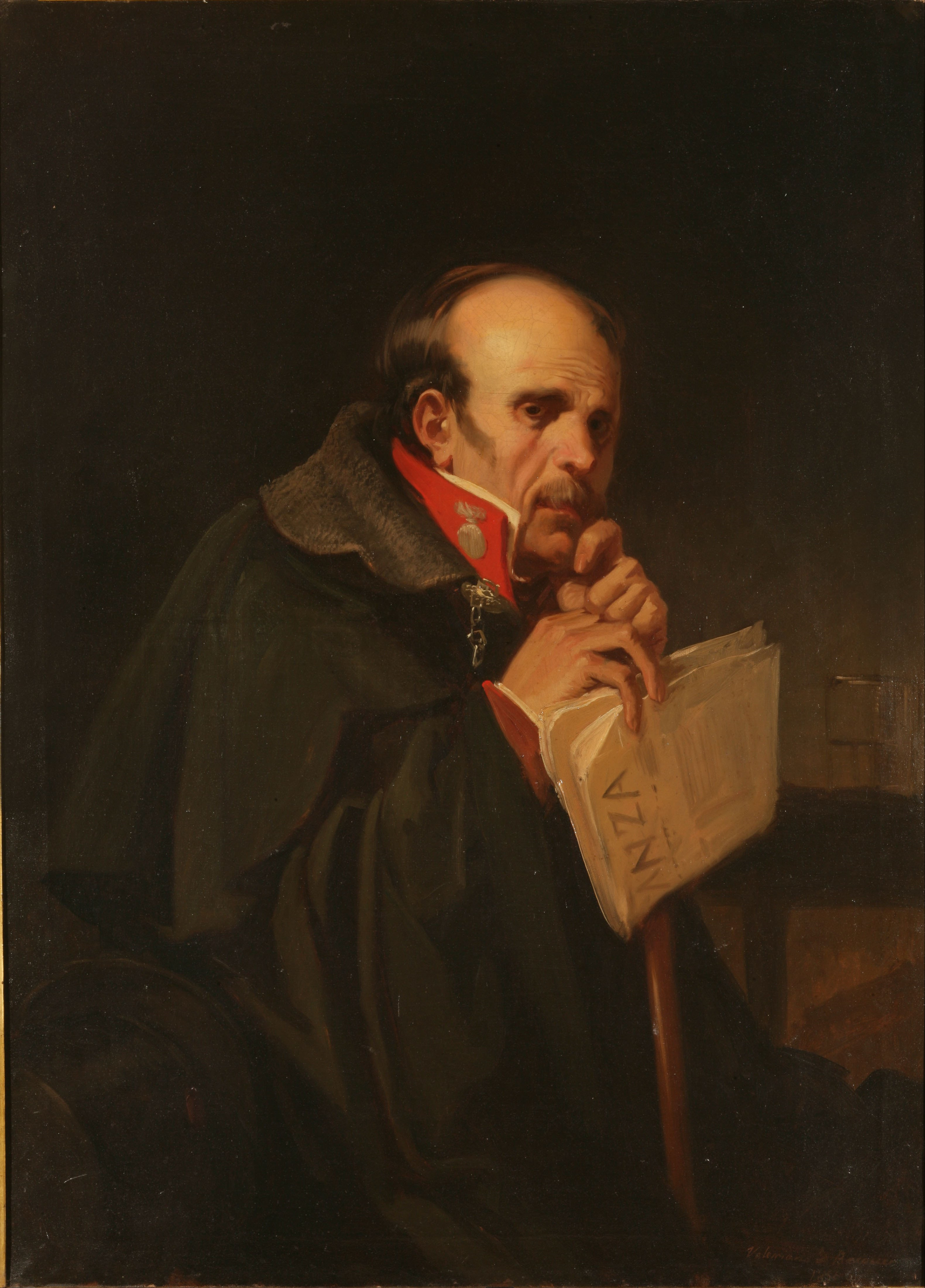 La obra representa a un artillero carlista que lleva en sus manos un ejemplar del periódico ultraconservador español La Esperanza.